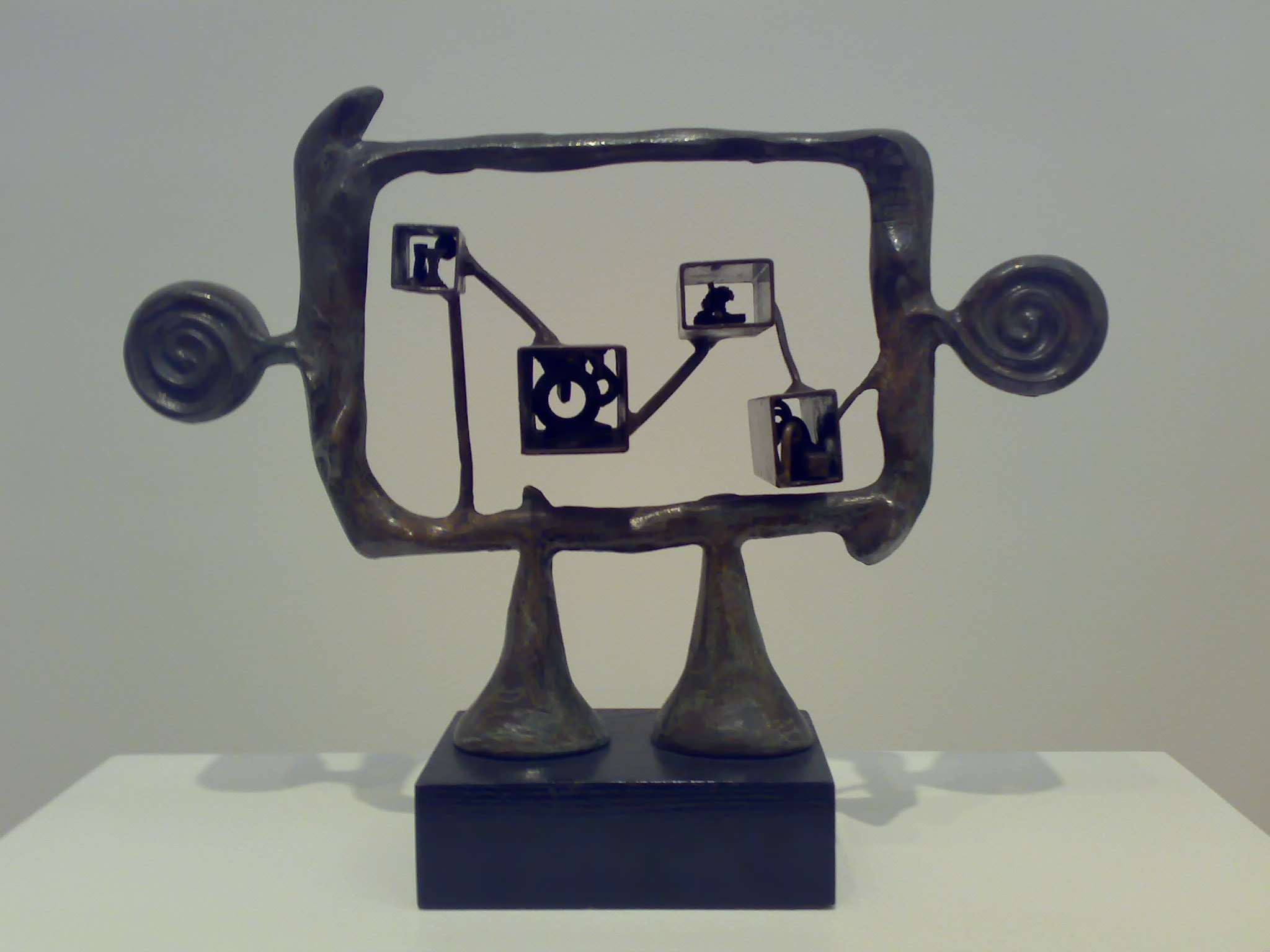 Escultura exposta en un museu al 2006.